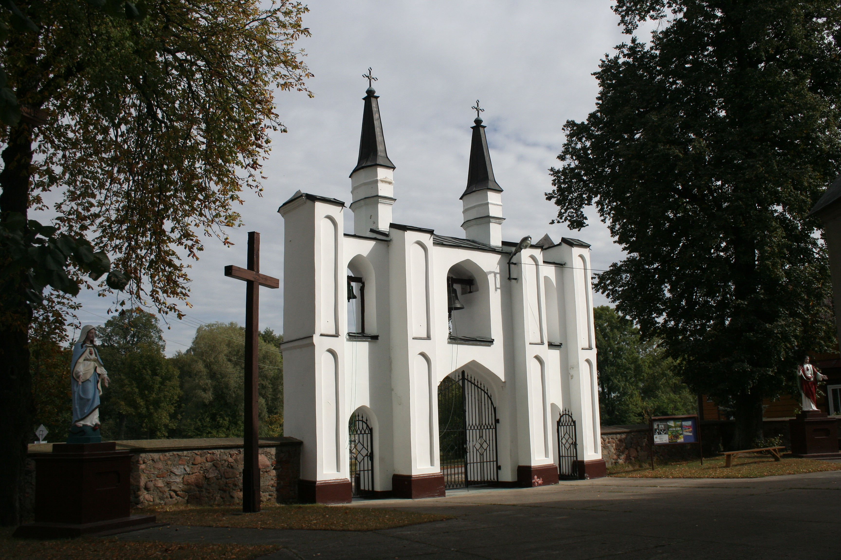 Huszlew - zespół kościoła parafialnego p.w. św. Antoniego Padewskiego, XIX; dzwonnica (zabytek nr /A-186)